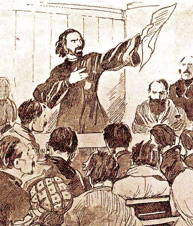 Георгий Гапон читает петицию в собрании рабочих накануне 9 января. Рисунок неизвестного художника